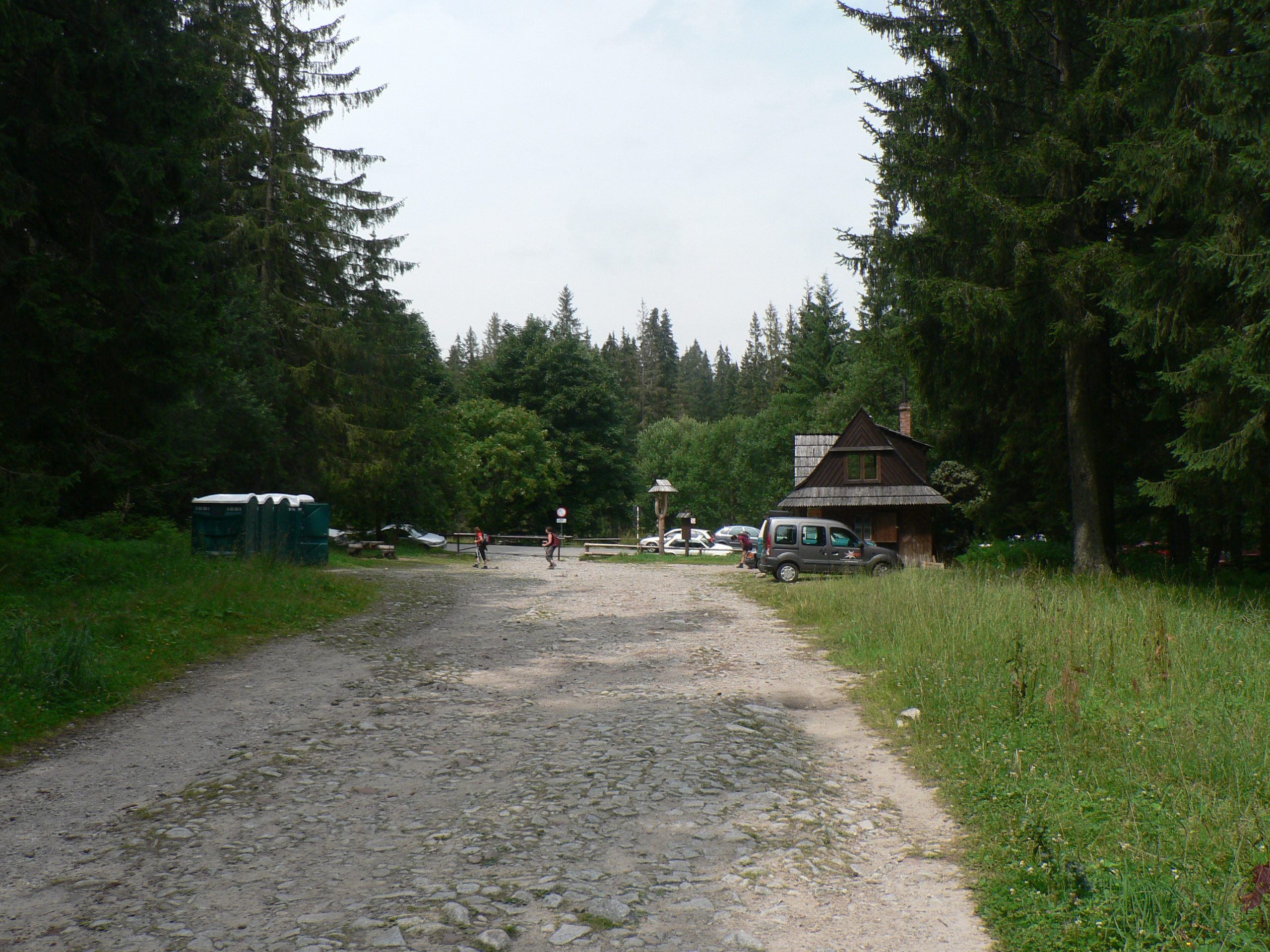 Brzeziny, parking przy początku Doliny Suchej Wody